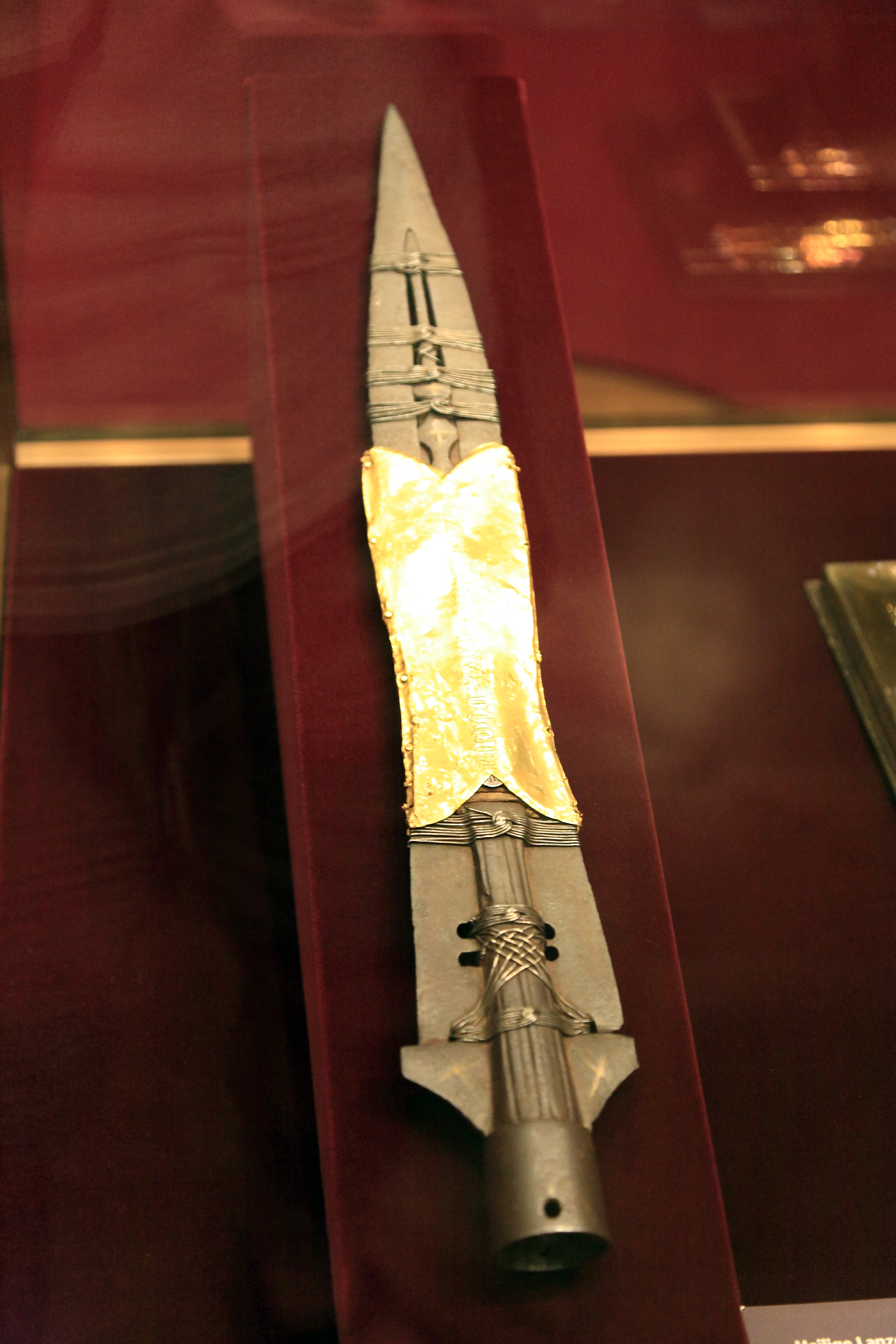 eigentlich eine karolingische Flügellanze und nach mehreren unterschiedlichen Deutungen schließlich angeblich die Lanze des Longinus, die sogar einen Nagel vom Kreuz von Jesus enthalten soll. Die Goldmanschette ließ Kaiser Karl IV. anbringen.